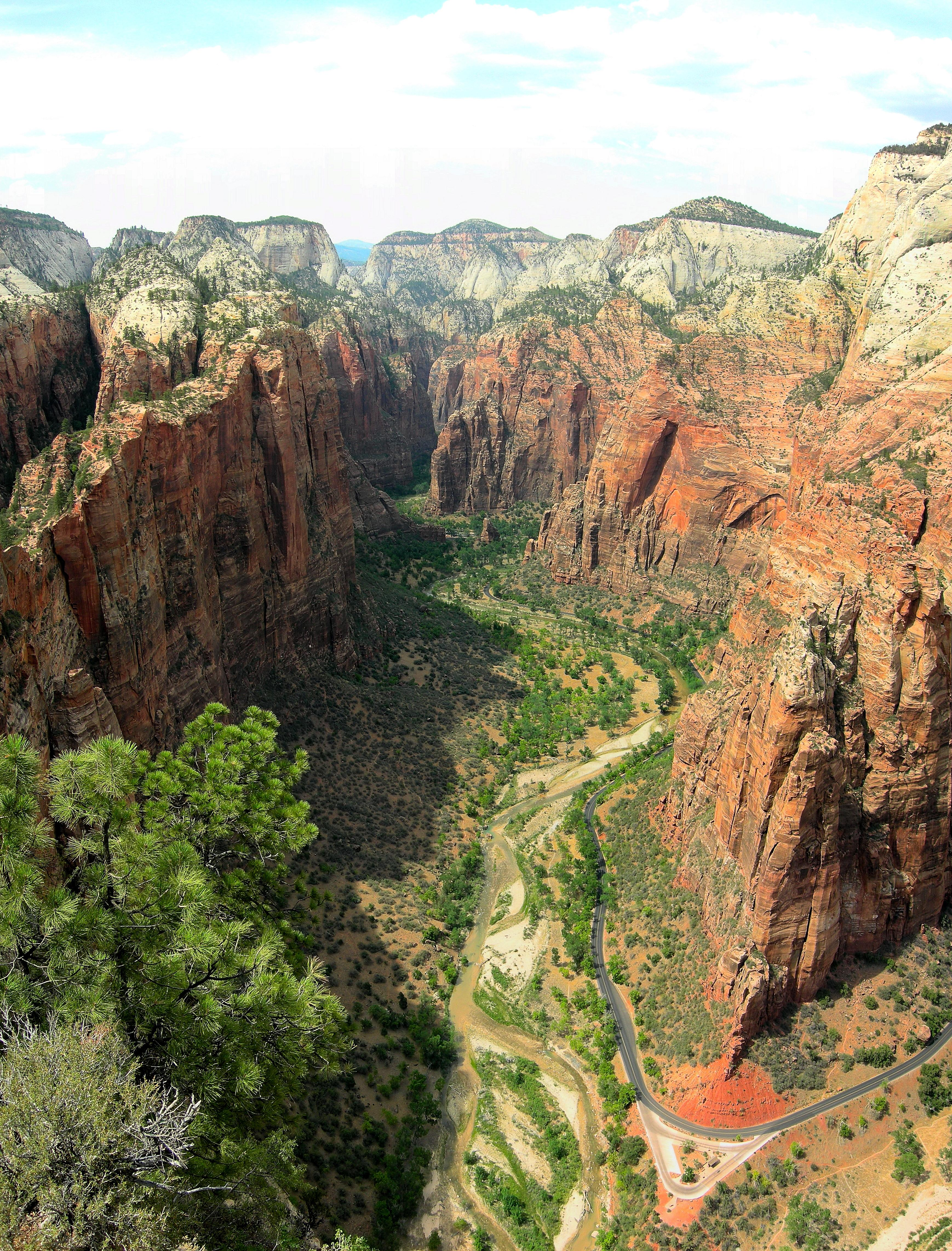 Angels Landing-Zion National Park-Utah